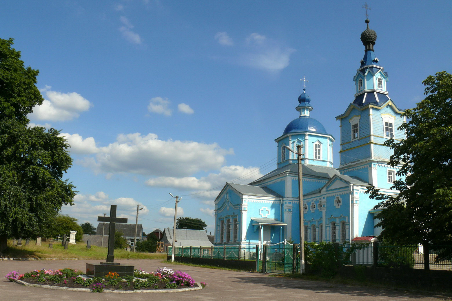 Боярка. Свято-Михайловская церковь